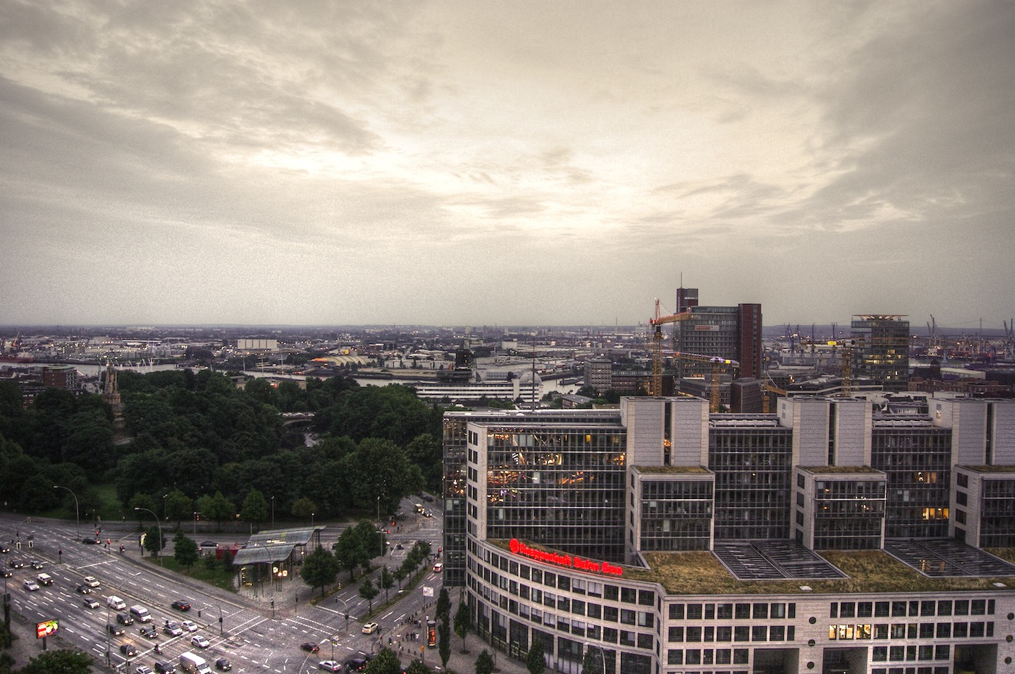 Heiligengeistfeld in Hamburg